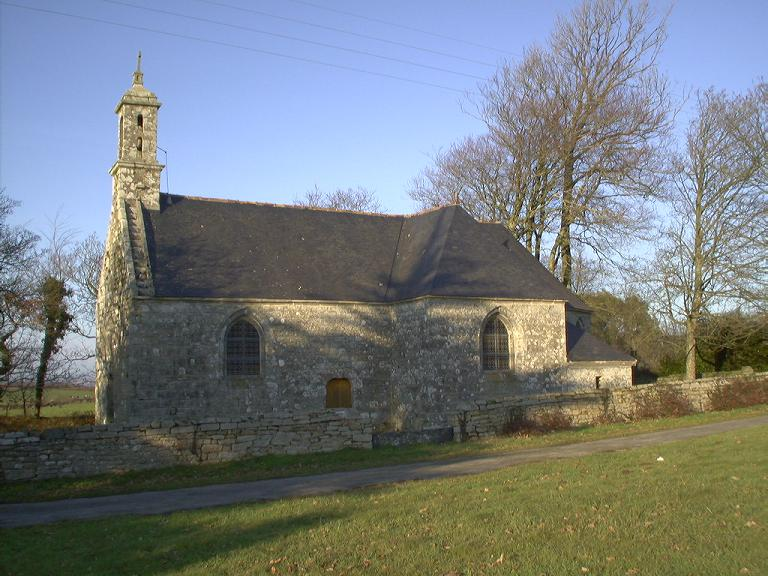 Chapelle de Notre Dame de la Clarté à Plonévez-Porzay